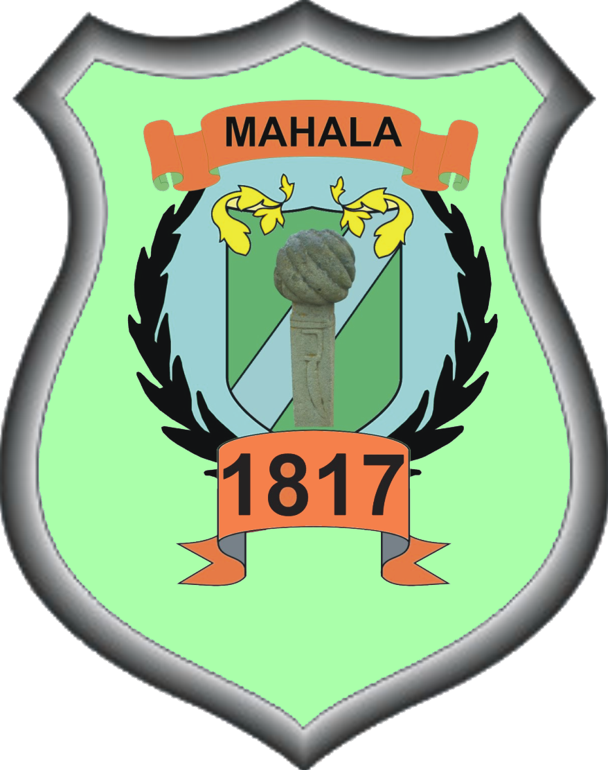 Grb naselja